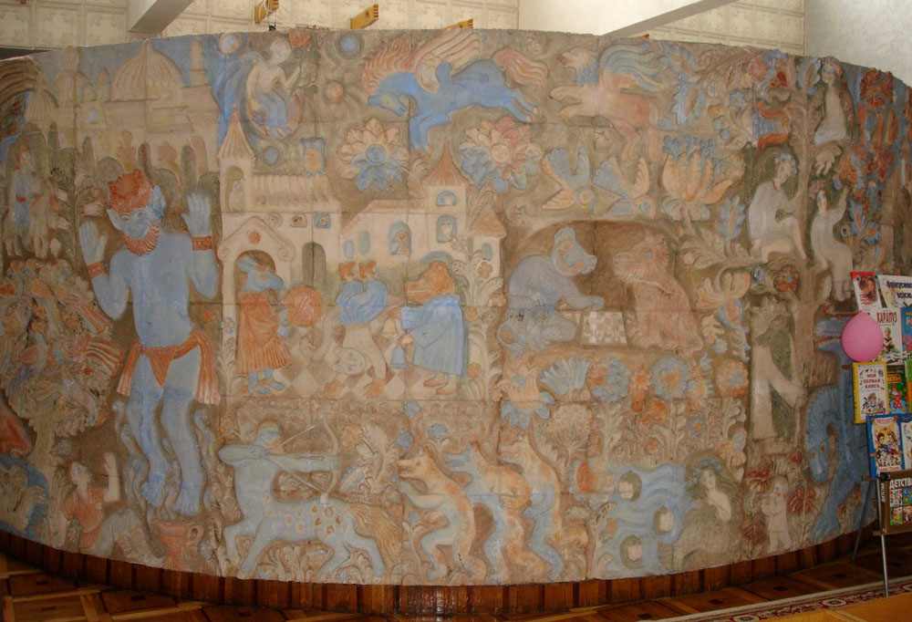 Панно "Сказки народов мира" в Детской библиотеке в Киеве